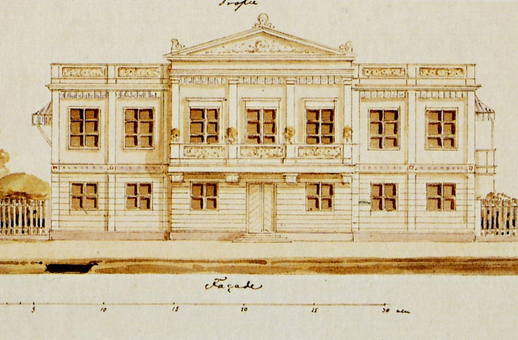 Villa Diorama på Djurgården kring 1846